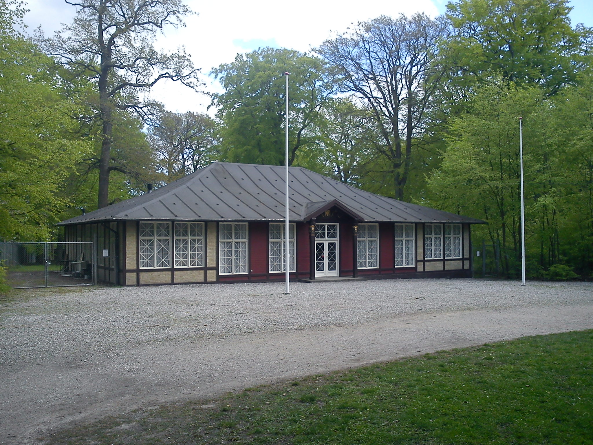 Skydepavillionen på Ferdinandspladsen.